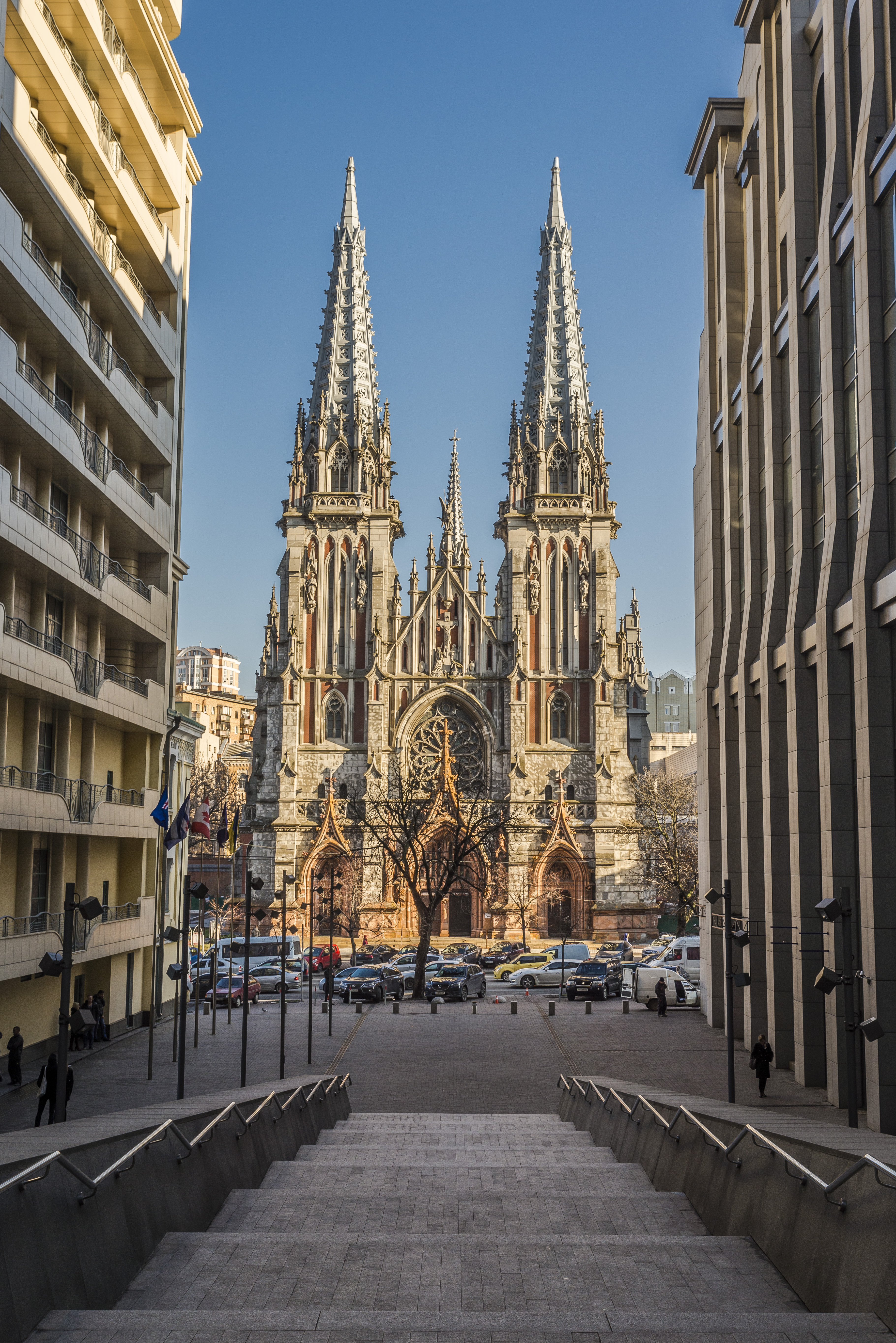 Костьол св. Миколая, Київ, Велика Васильківська вул., 77